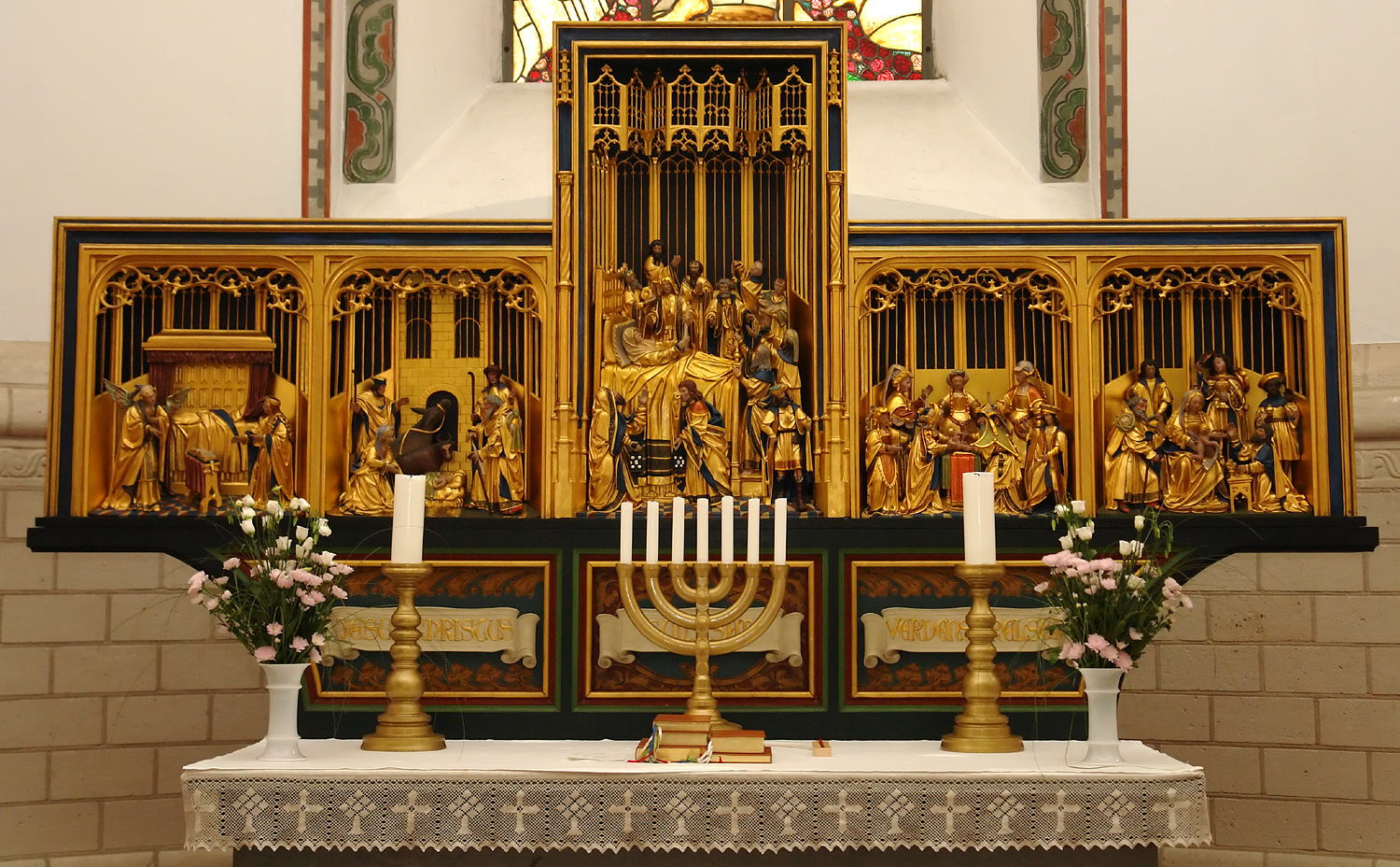 Kirche von Holstebro: Altartafel niederländisch etwa 1510. Felder von links: Mariä Verkündigung, Geburt Christi, Sterben der Jungfrau Maria, die Beschneidung, Anbetung durch die heiligen drei Könige.